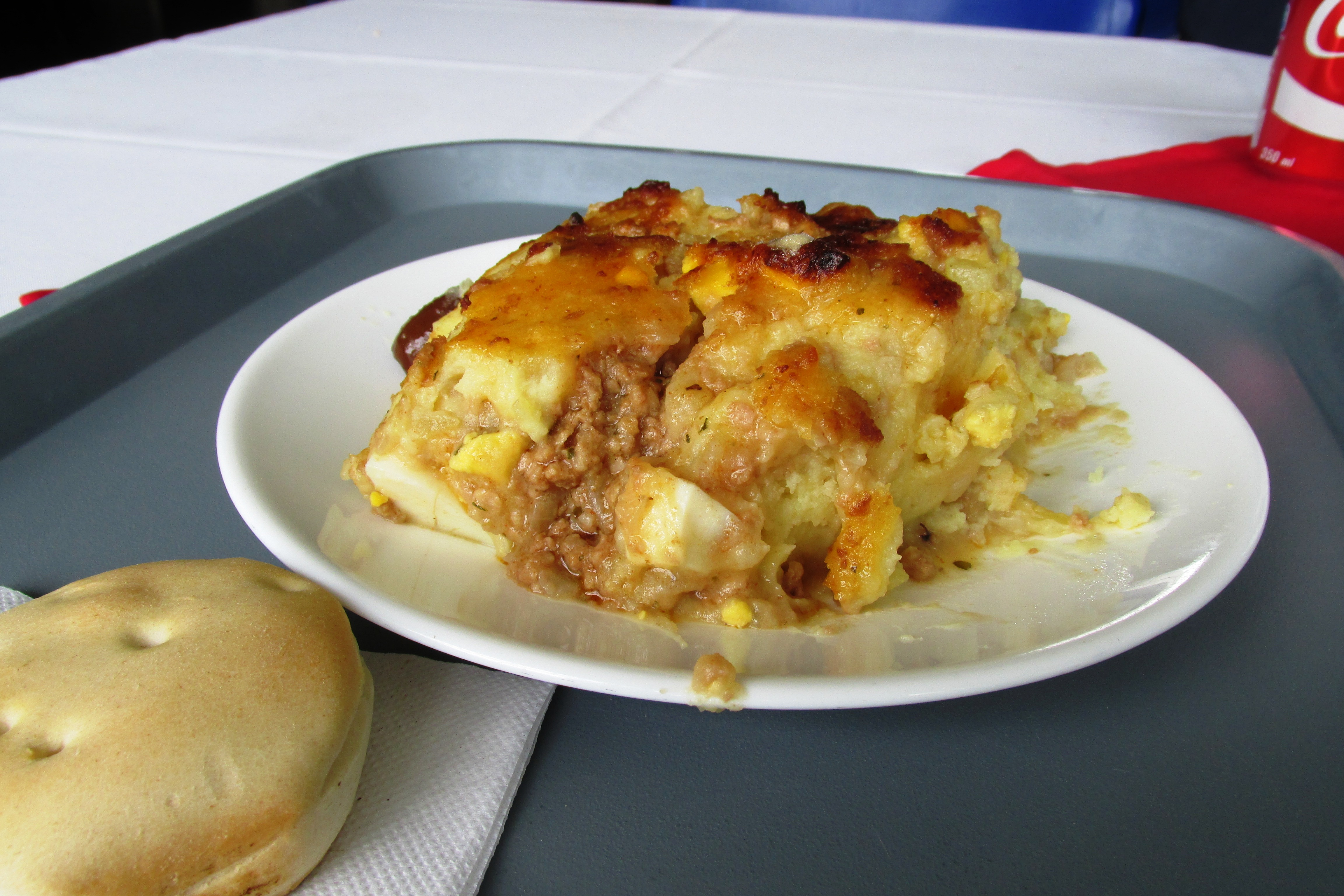 Pastel de Papas